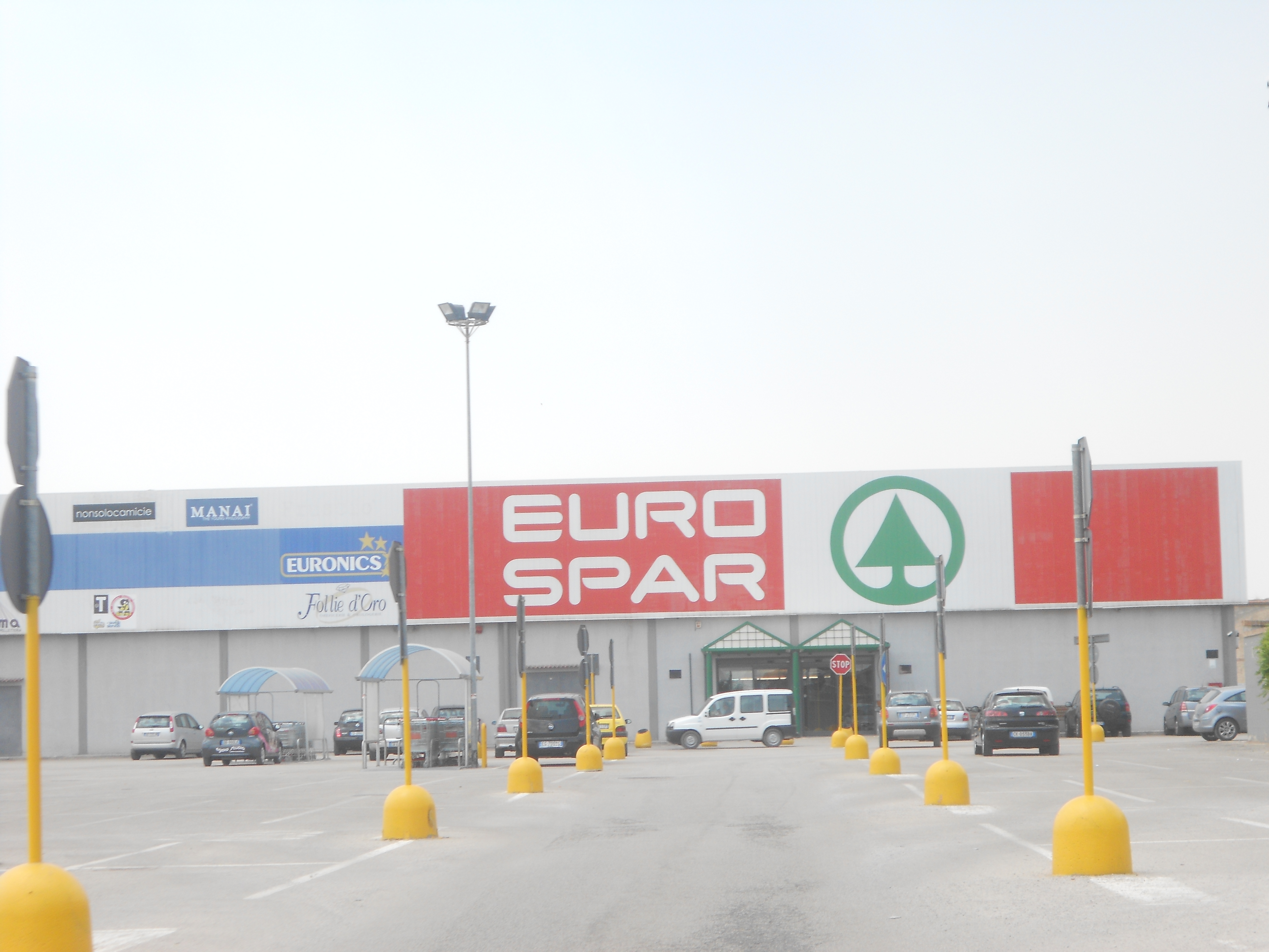 Il Più grande ipermercato col marchio Eurospar in Italia